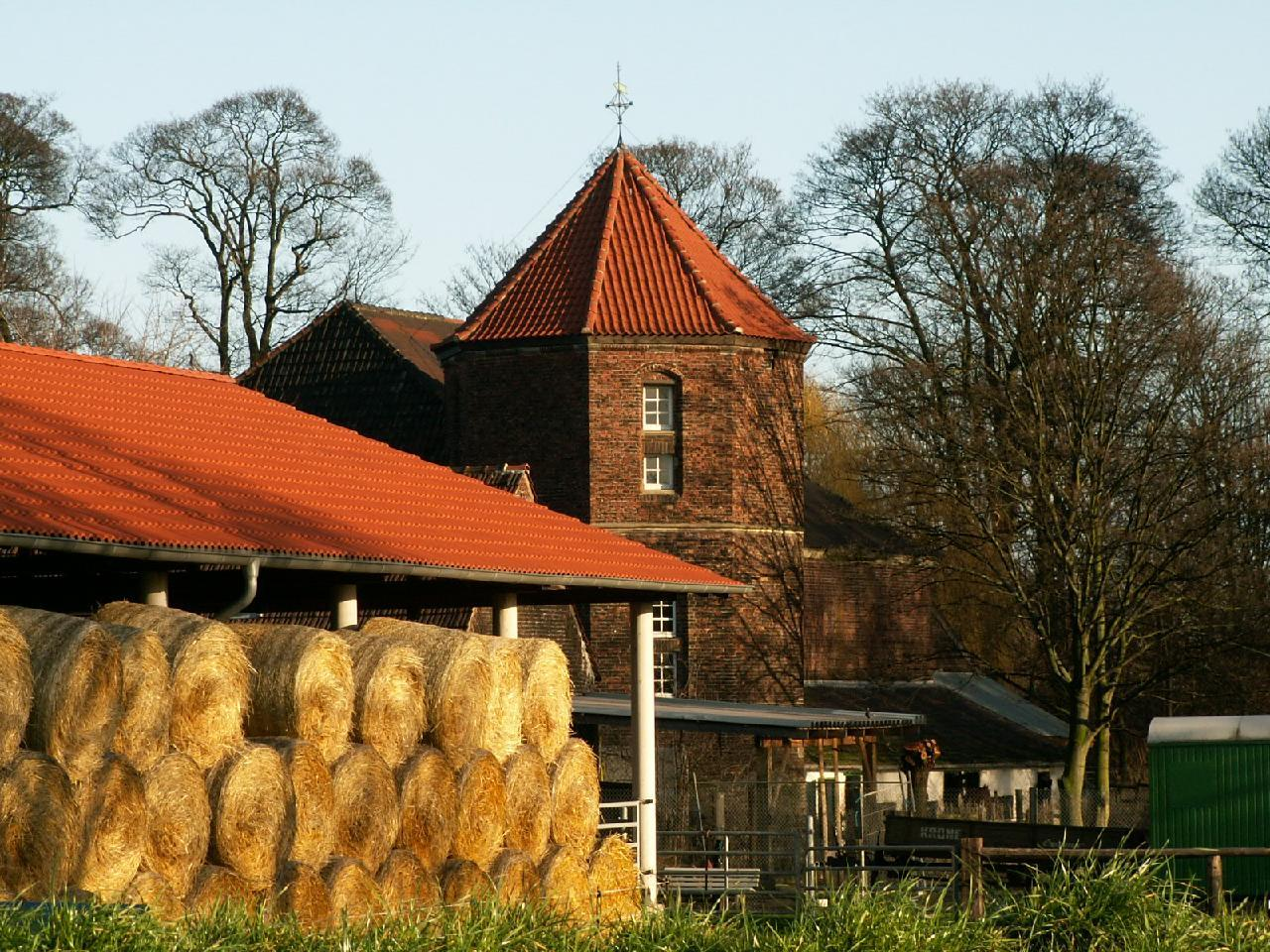 Einzig erhaltenes Bauwerk auf dem Werthschenhof, der achteckige Südostturm in 47229 Duisburg-Rheinhausen